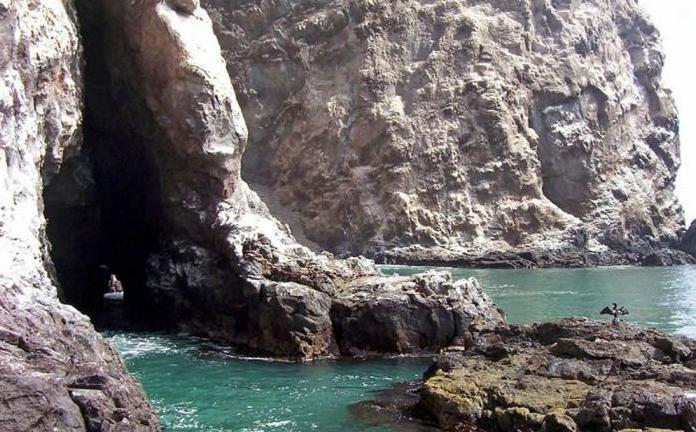 Acantilados de Caleta Vítor, Tarapacá, Chile